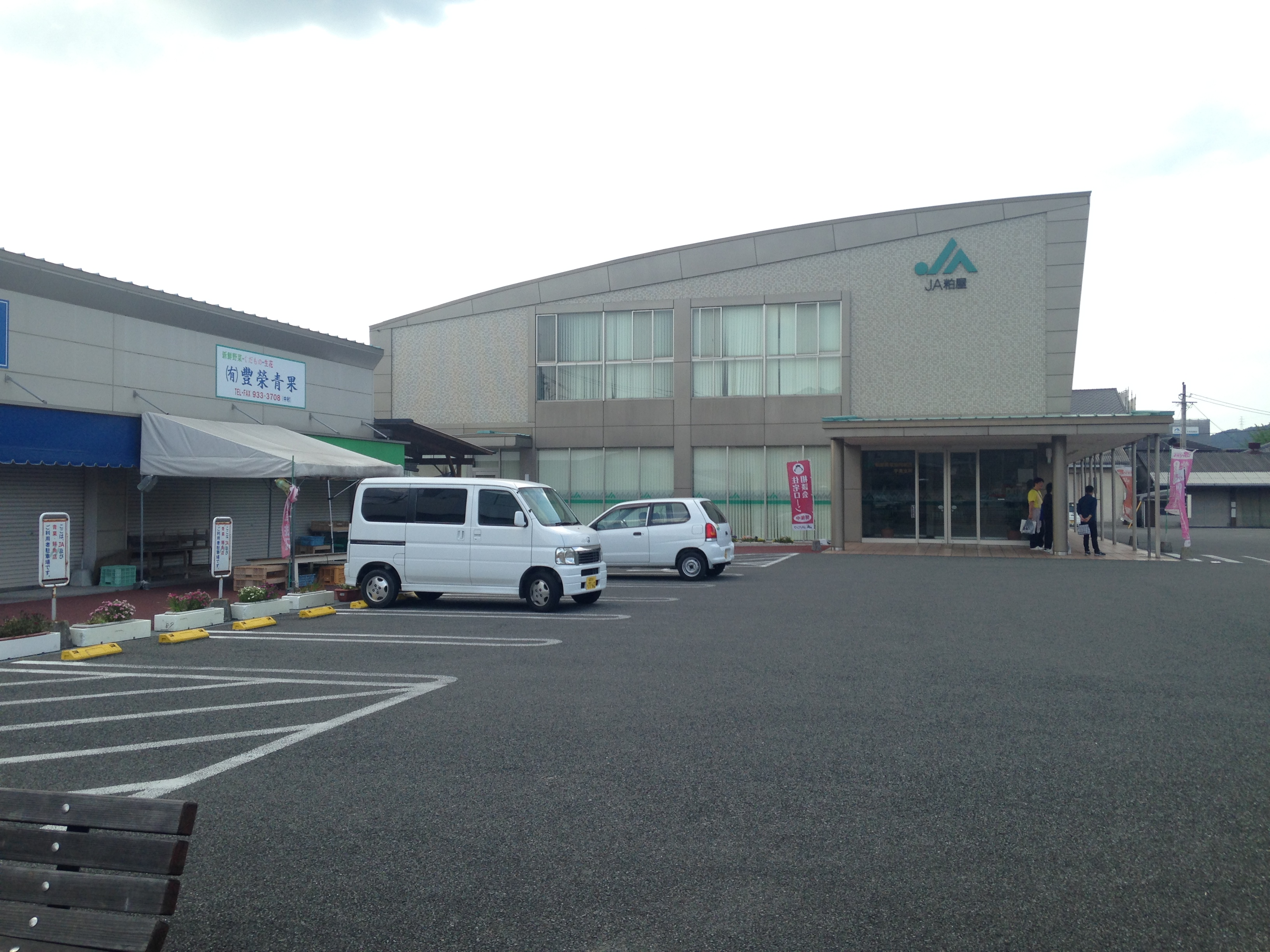 JA粕屋宇美支店